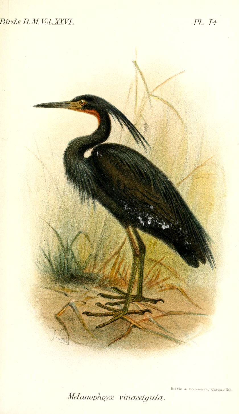 Melanophoyx vinaceigula = Egretta vinaceigula, Slaty Egret